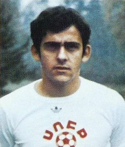 Michel Platini en 1975, 'Ageducatifs Football 1975 - 1976', Panini figurina n°1572.